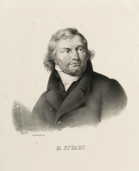 Portret van Martinus Stuart (1765-1826), remonstrants predikant en historicus